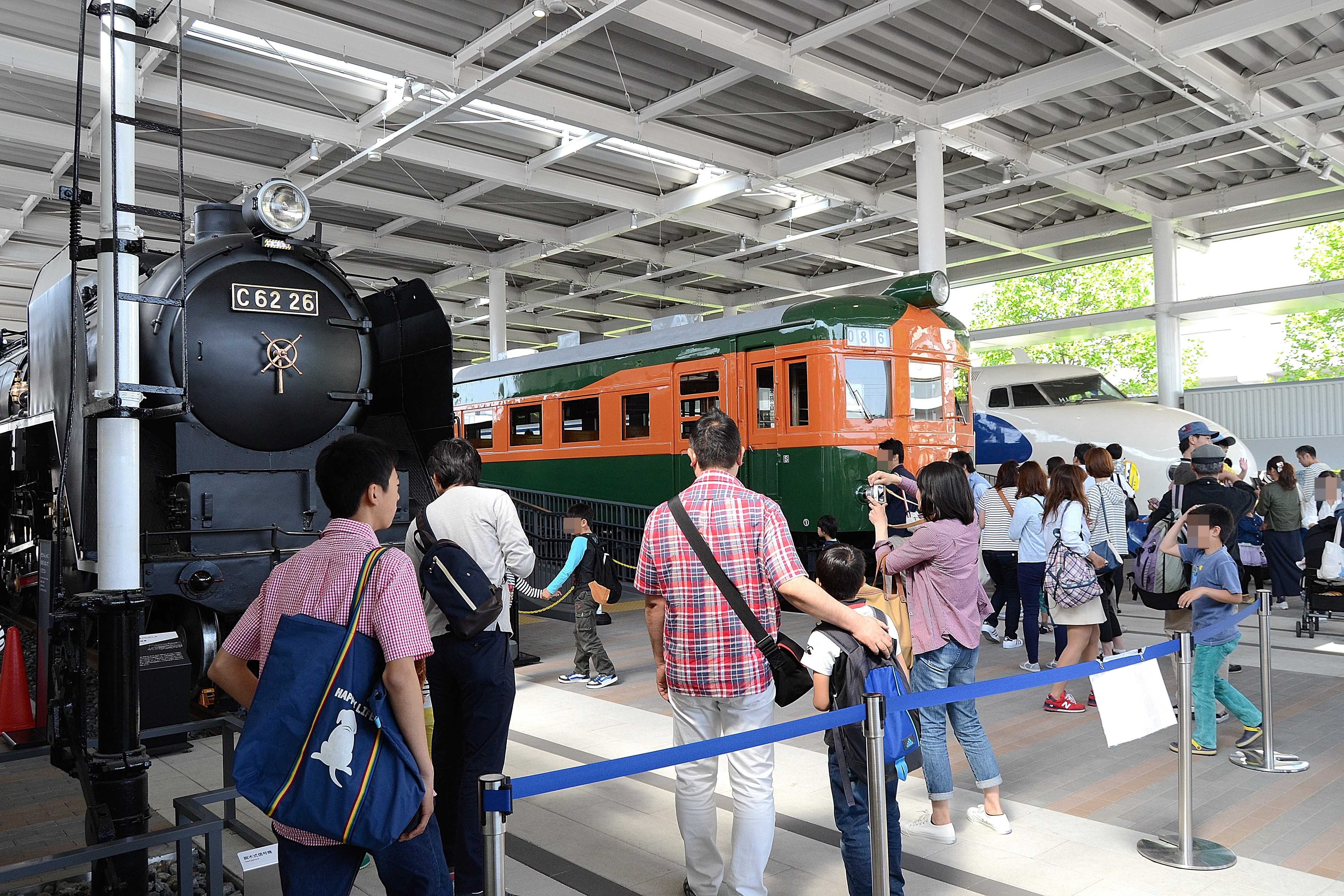 京都鉄道博物館にあるプロムナード（入口側）